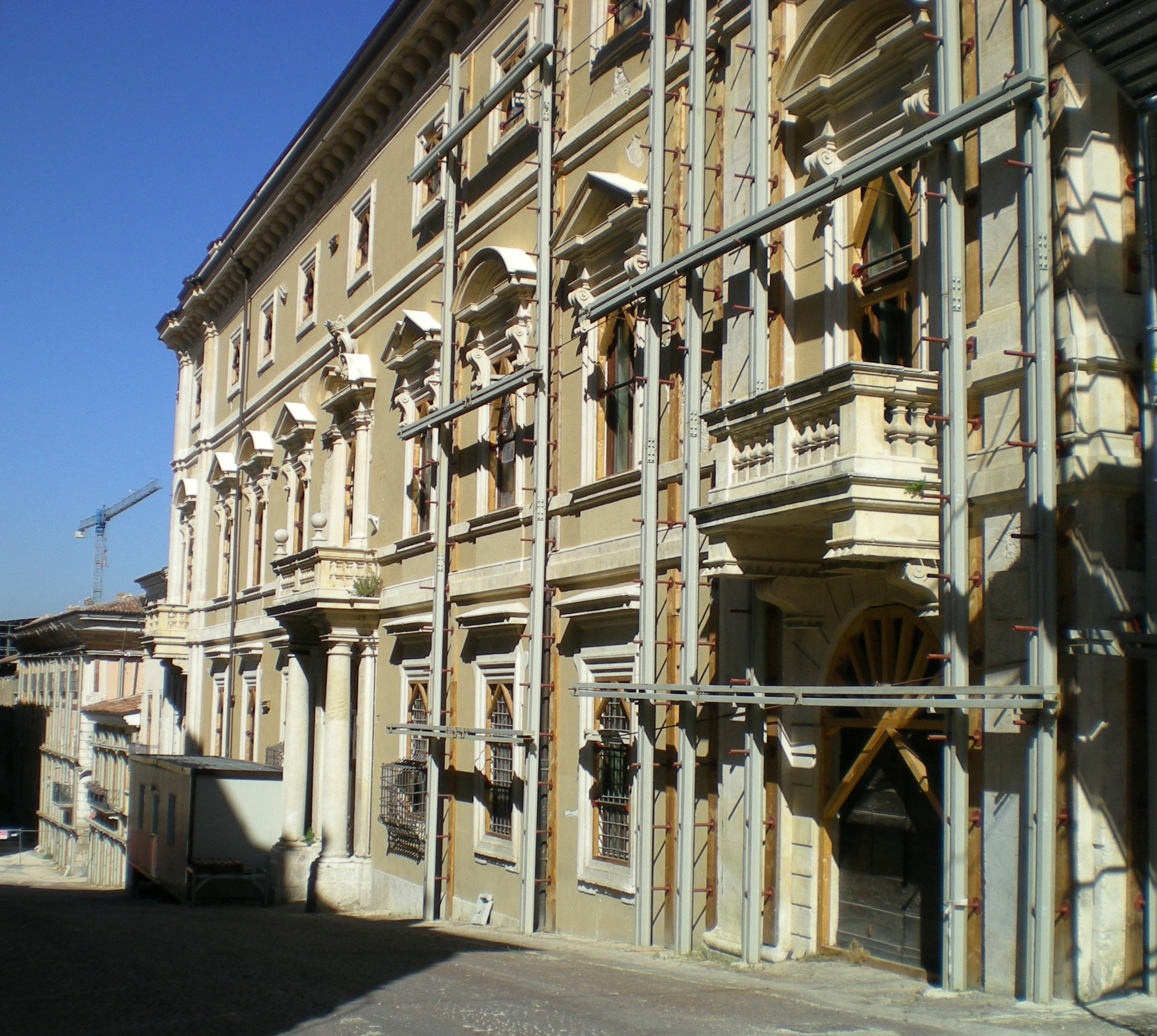 Palazzo Quinzi, puntellato dopo il terremoto del 2009